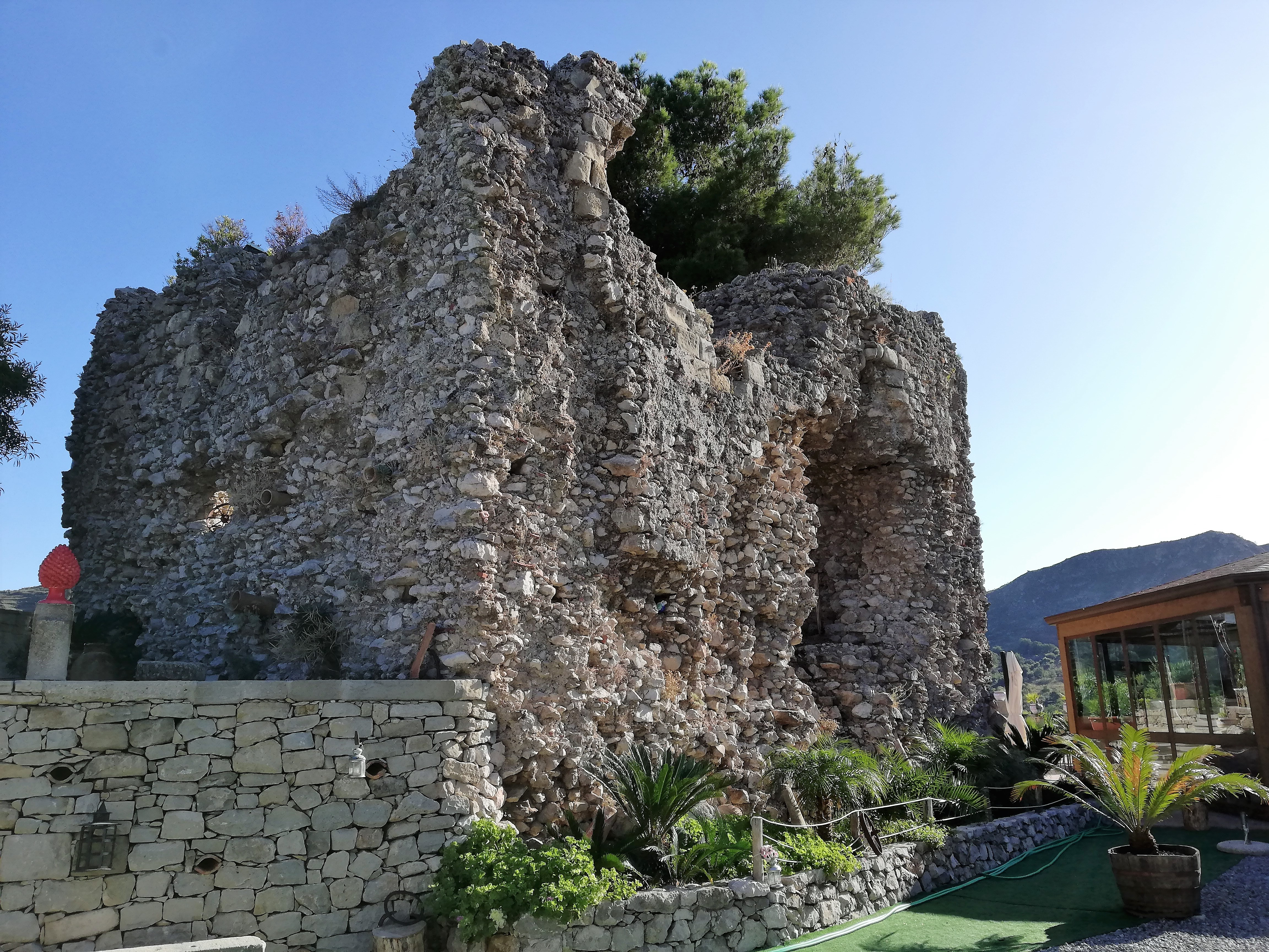 Inquadratura da meridione.